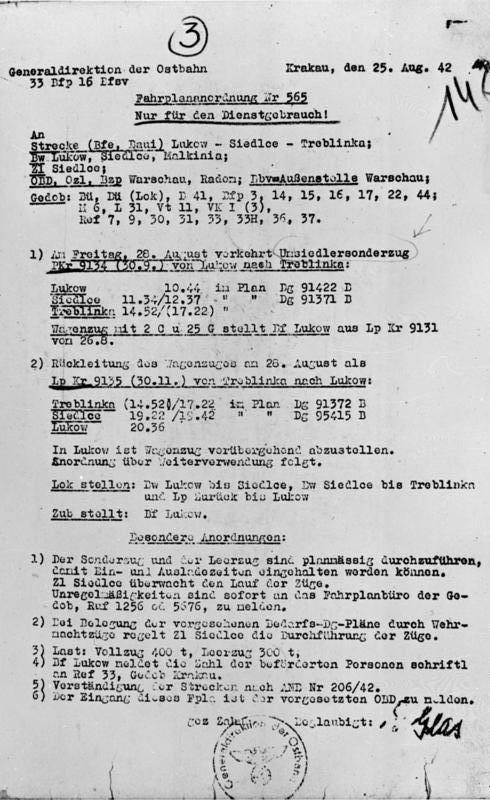 KZ, Fahrplananordnung Zentralbild 9.5.1964 Zur Einweihung der Gedenkstätte auf dem ehemaligen Vernichtungslager Treblinka am 10. Mai. Nicht allzuweit von Warschau entfernt, aber in einer fast menschenleeren Gegend mitten in Wäldern gelegen wurde Mitte 1942 mit dem Bau von Treblinka II begonnen. Treblinka I, etwa 3 km davon entfernt, war von der SS schon im November 1941 als Arbeitsstraflager für "renitente Polen" errichtet worden. Das Vernichtungslager umfaßte ein Gebiet von 13,5 ha. Es war mit einem elektrisch geladenen Stacheldrahtzaun umgeben. In Treblinka wurden die Opfer mit Verbrennungsgasen getötet, die von Motoren aus einem Nebenraum in die Gaskammern geleitet wurden. Die nazistischen Mörder taten alles, um den zur Vernichtung bestimmten Menschen ihre verbrecherischen Absichten zu verheimlichen. Die in westeuropäischen Ländern "zur Umsiedlung nach dem Osten" bestimmten Juden wurden in Personenzügen nach Treblinka befördert. UBz: Faksimile einer erhalten gebliebenen Fahrplananordnung vom 25.8.1942. [Konzentrationslager Treblinka.- Fahrplananordnung]